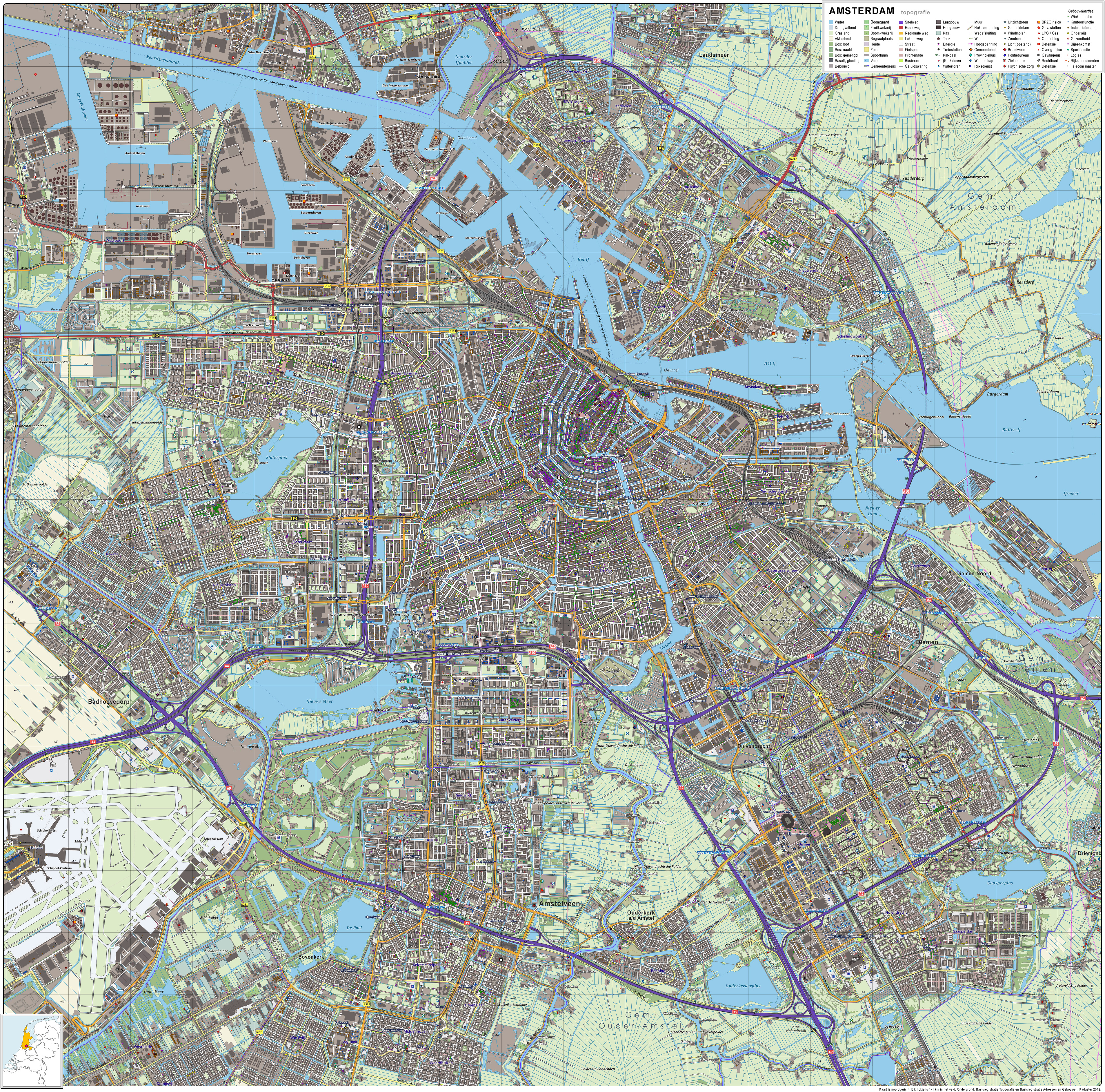 Topografisch beeld van de stad Amsterdam. Op basis van de GML open geodata van de BRT/Top10NL (basisregistratie Topografie, Kadaster 2012), vrijgegeven door Kadaster op 30-11-2012 onder de Creative Commons BY licentie. Gebouwvlakken vanuit Open Geodata BAG extract (december 2012). Samenstelling en kleurenschema: Jan-Willem van Aalst, met QuantumGIS en Photoshop.